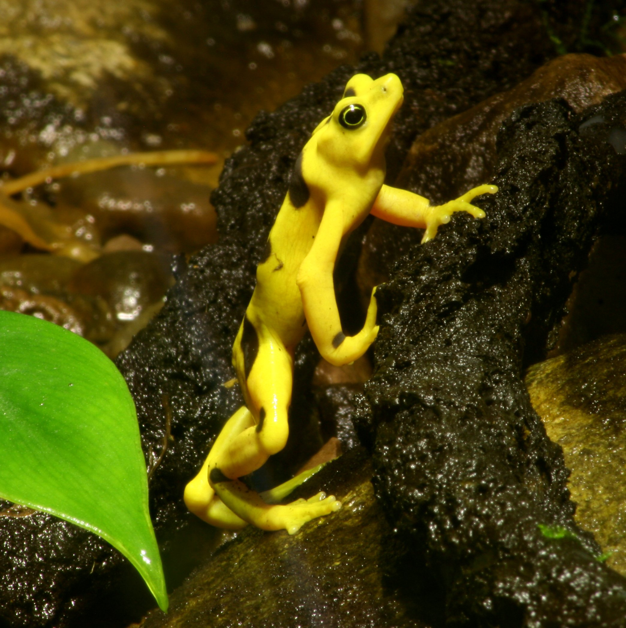 Atelopus zeteki, Panamanian golden frog (Atelopus zeteki, a.k.a. Atelopus varius zeteki) at the Buffalo Zoo